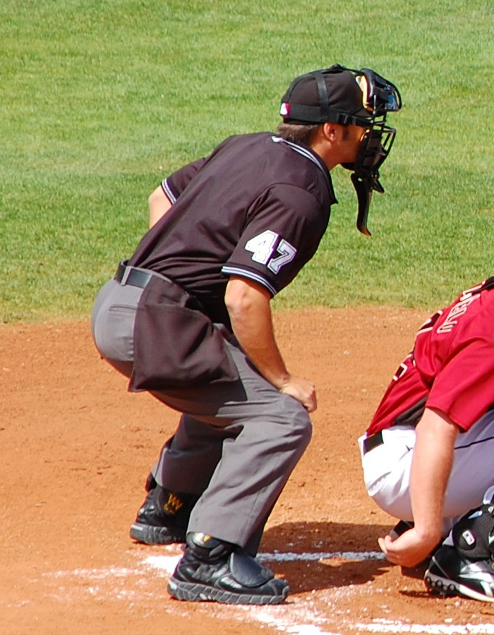 Mark Wegner